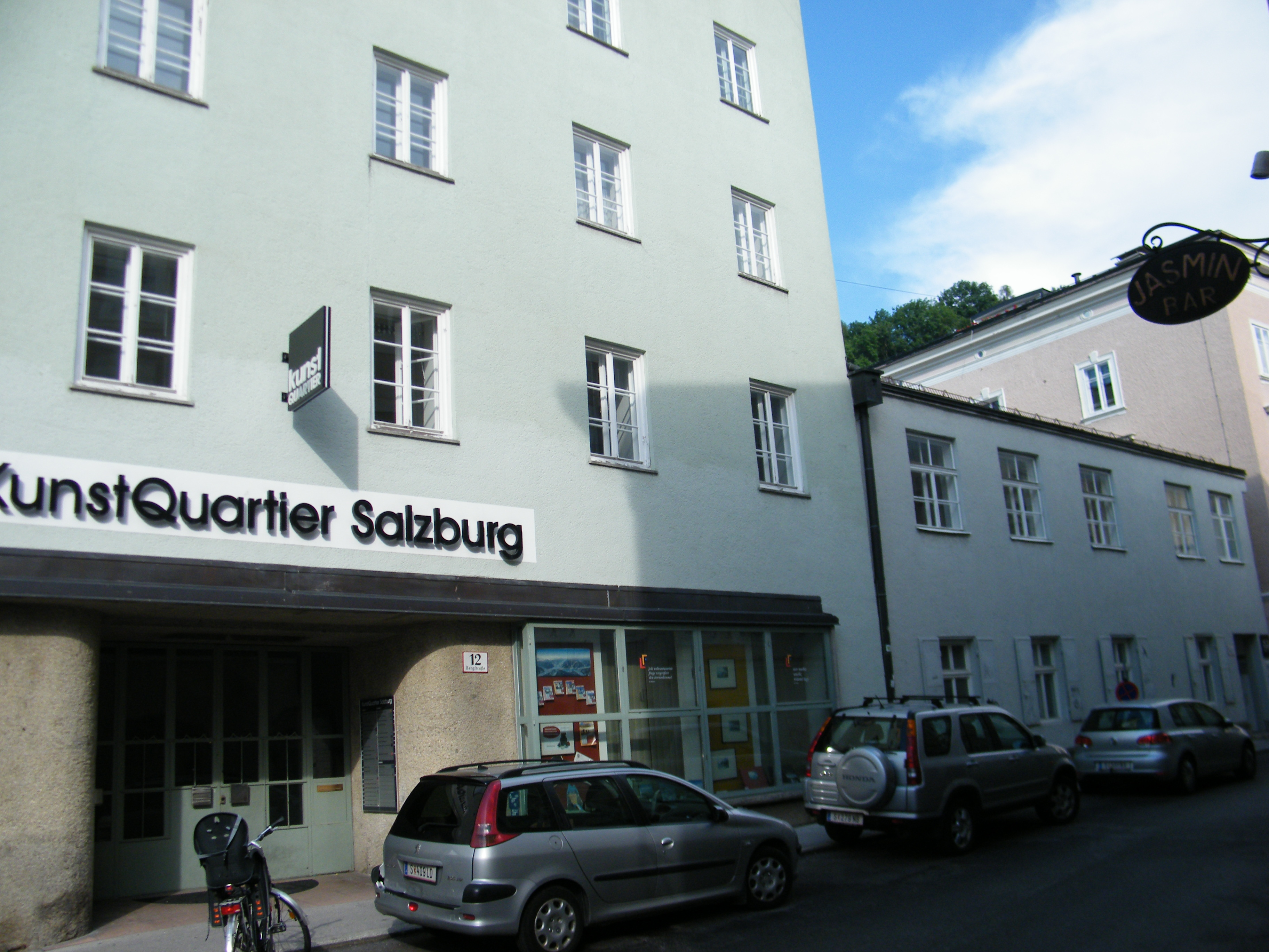 1713–53 Johann Christoph Egedacher Haus